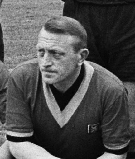 Victor Lemberechts